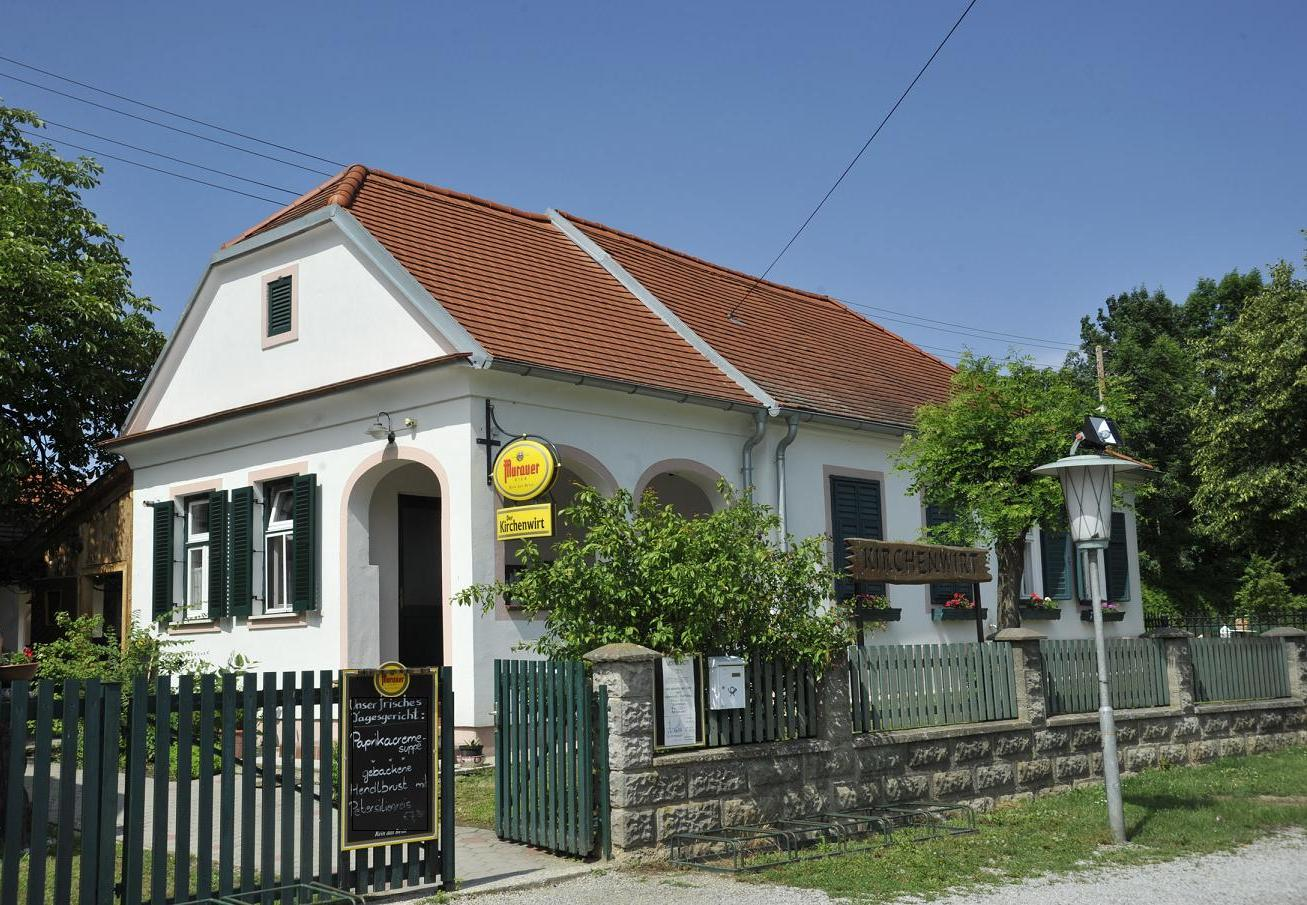 Gasthaus Kirchenwirt